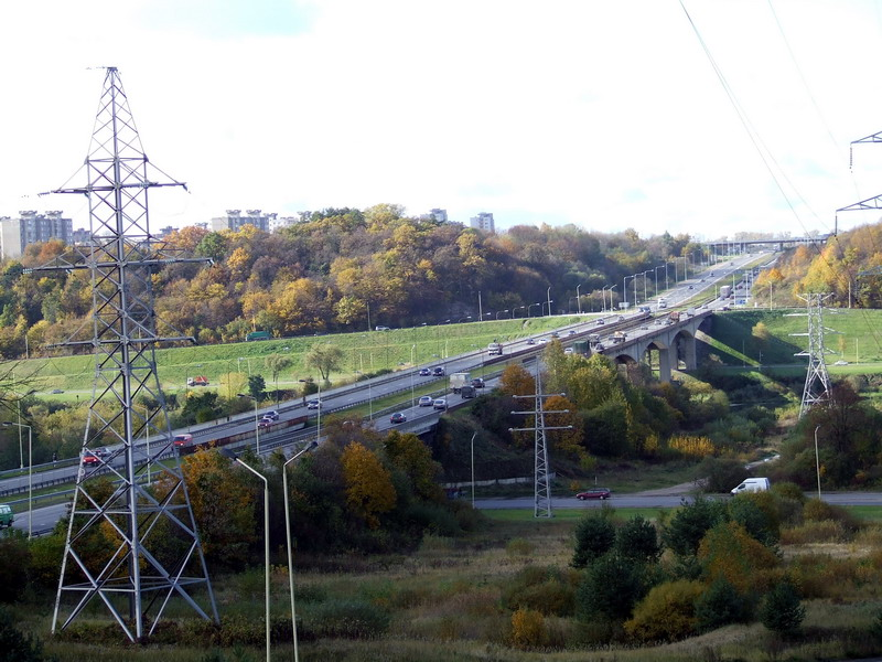 Kleboniškio tiltas, Kaunas.